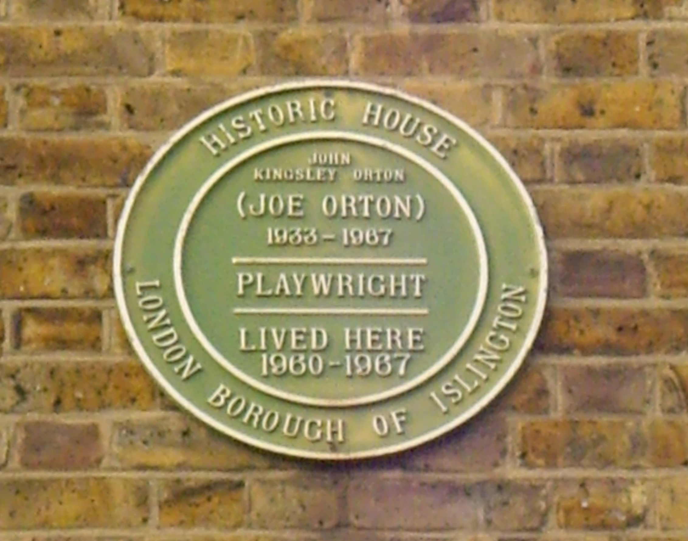 Plaque to Joe Orton, Islington, London